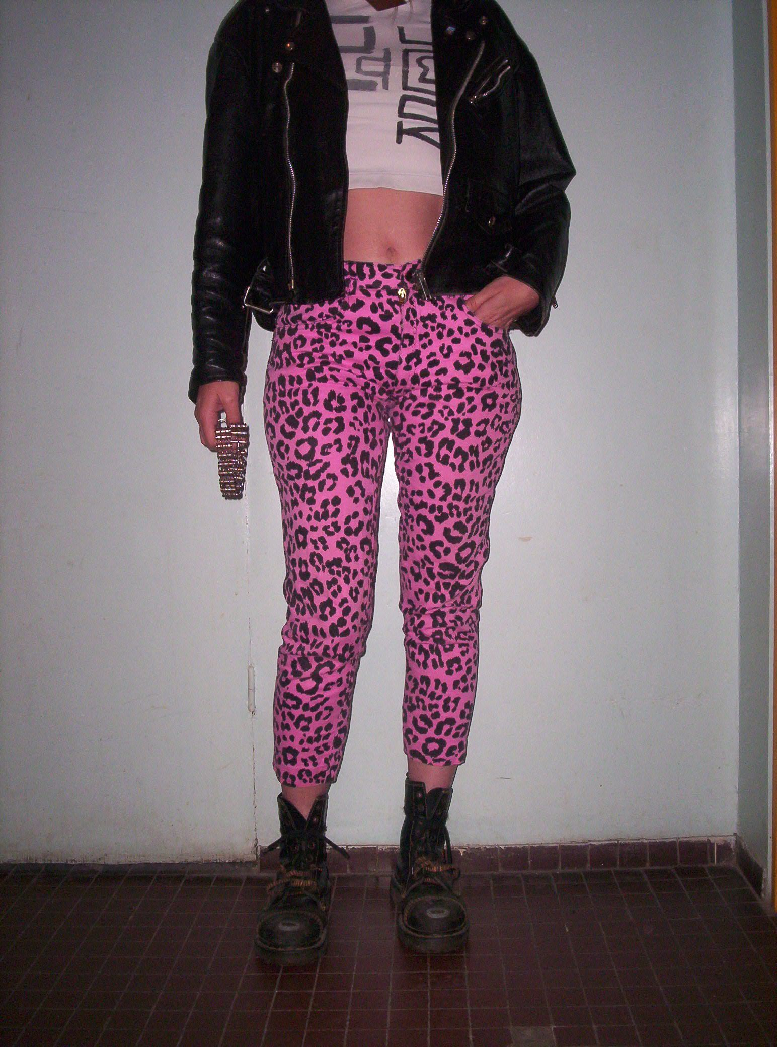 Exemple de tenue punk / sample punk's look